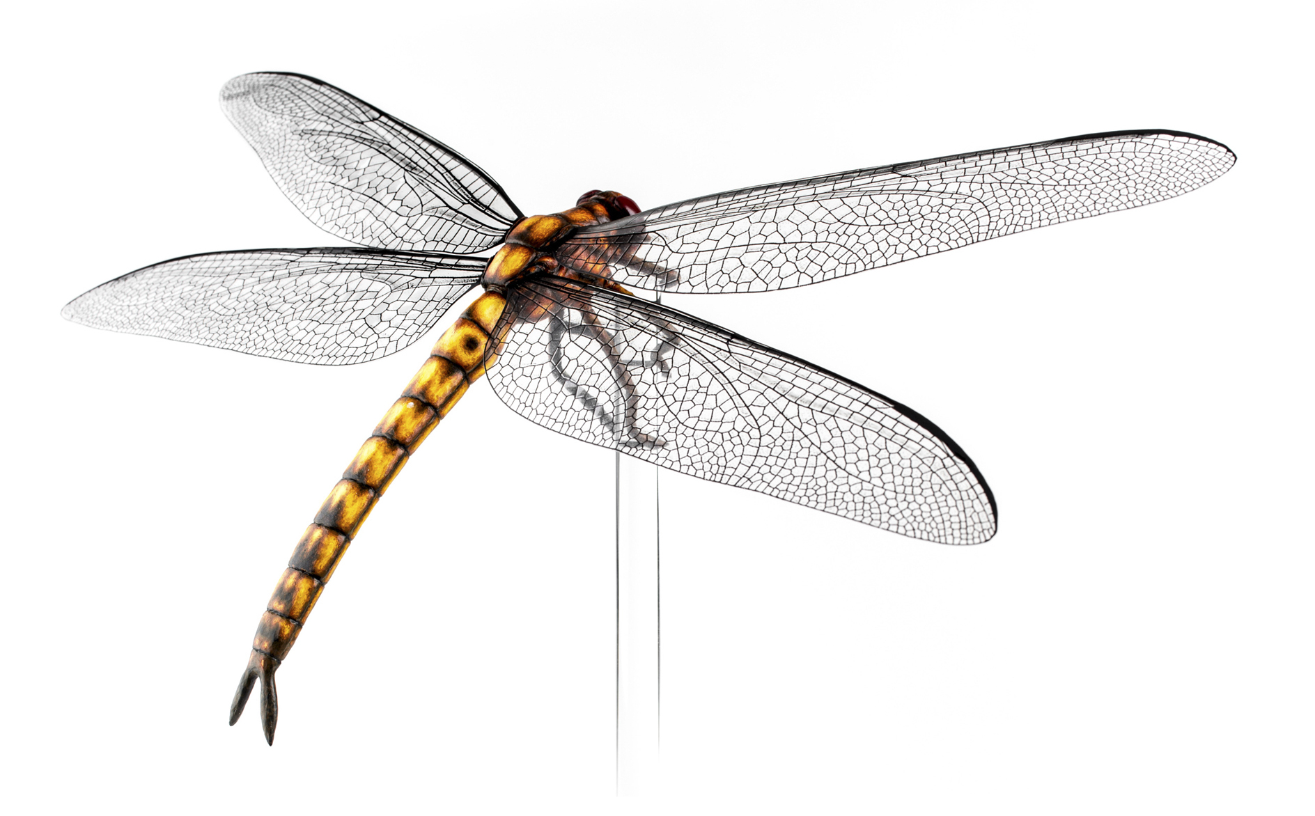 Ricostruzione in scala 1:1.